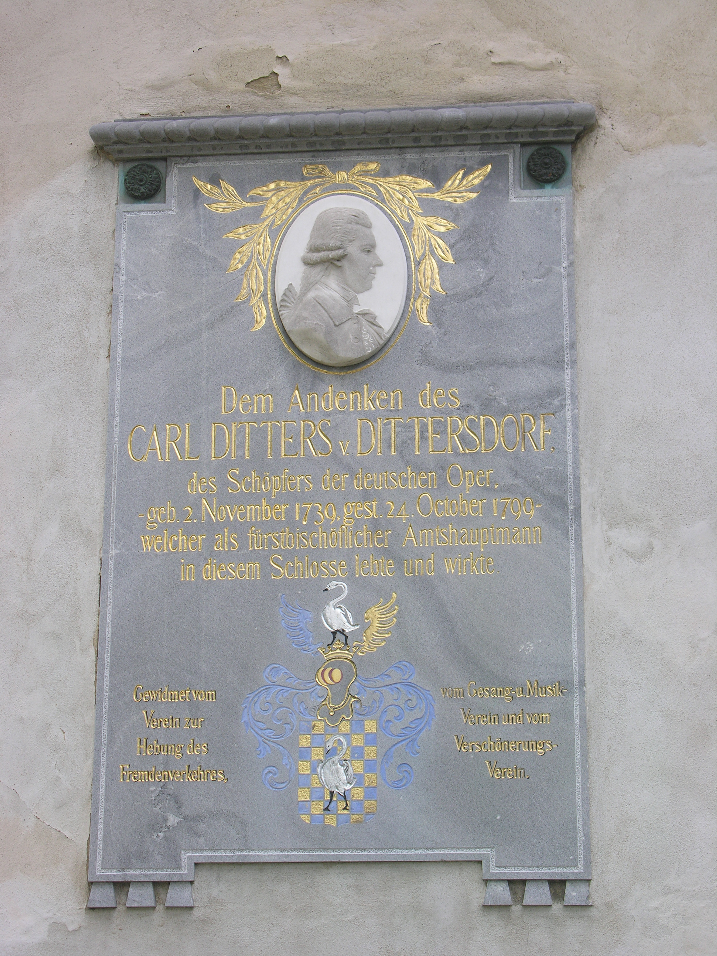 Tablica ku czci Karla Dittersa von Dittersdorfa przed wejściem do zamku w Jeseniku